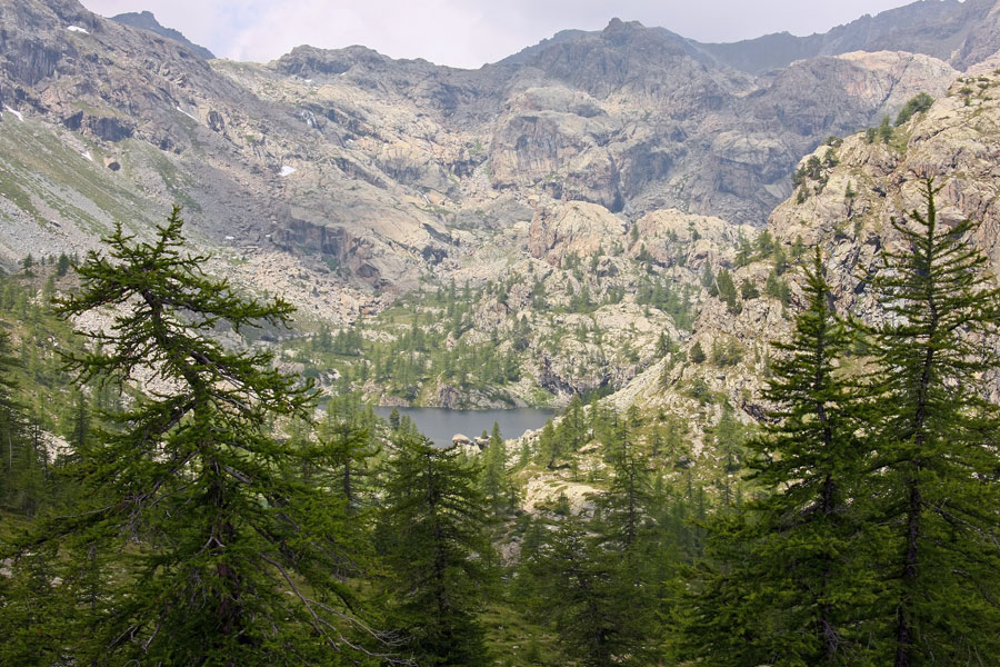 Scorcio del parco naturale del Mont Avic (Valle d'Aosta) con il lago Cornu, scattata nei pressi del rifugio Barbustel